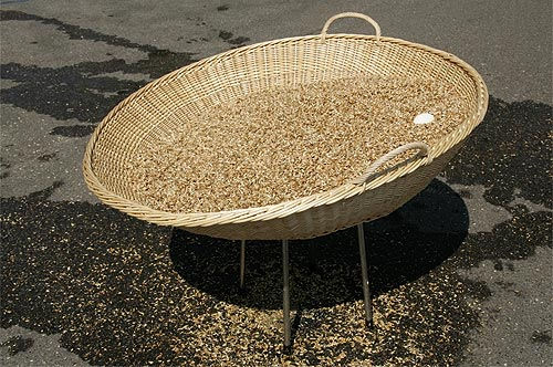 Eierleset in Arlesheim: Fangkorb mit Spreu und einem Ei